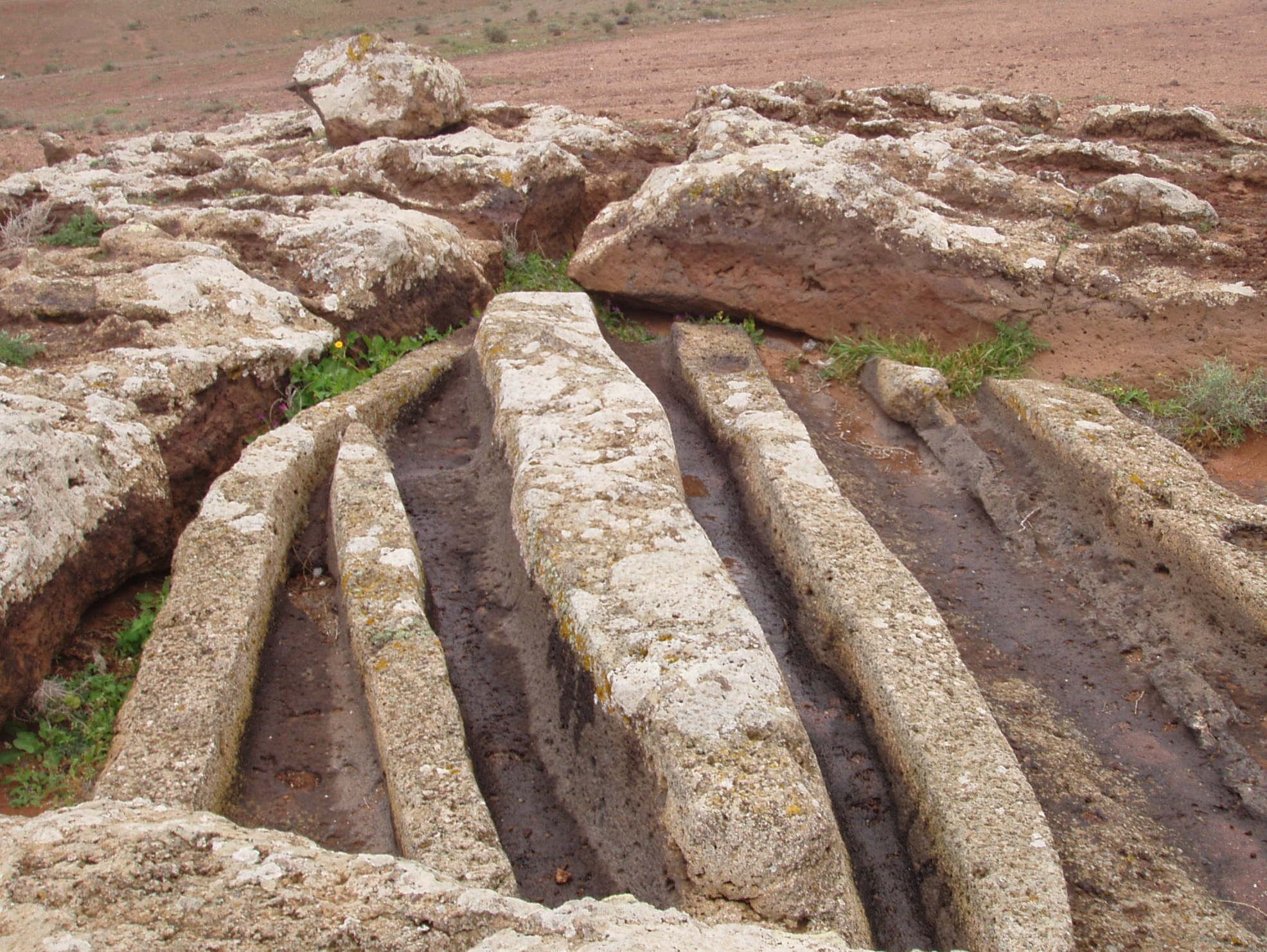 Quesera de Zonzamas, Lanzarote, prehistoric artefact